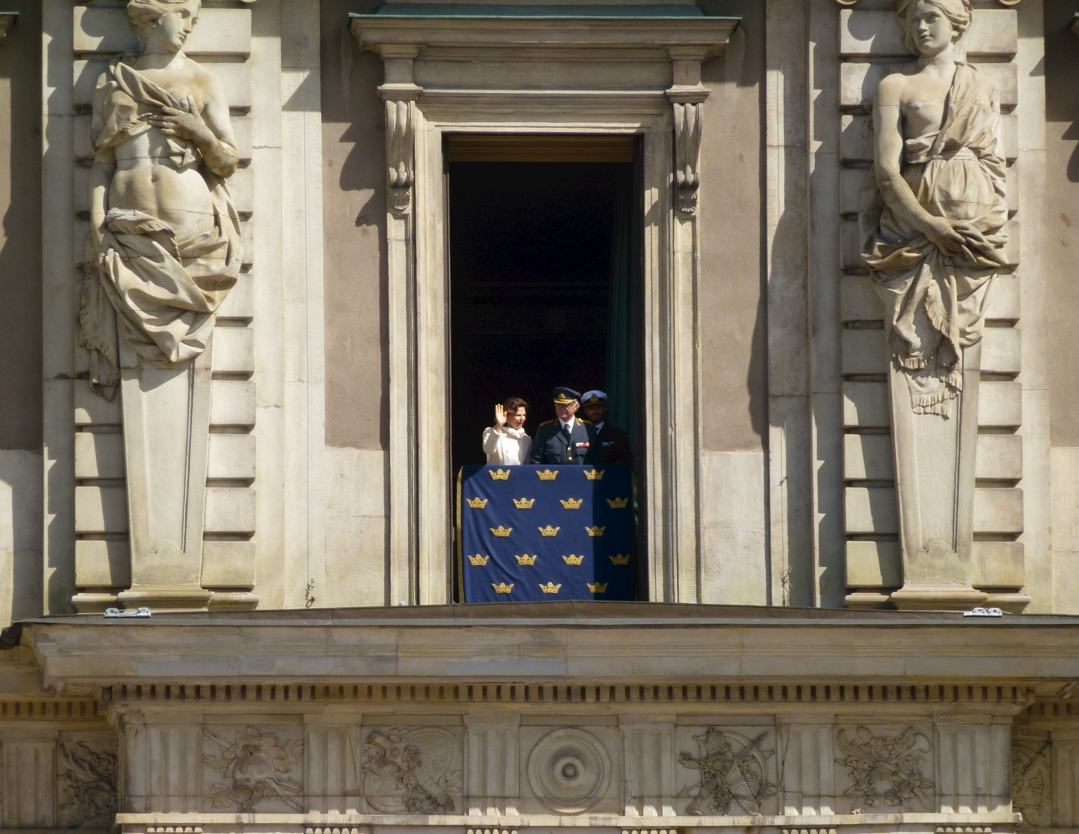 Kungen och Drottningen vinkar ut från Vasaordens sal, Stockholms slotts västra fasad.